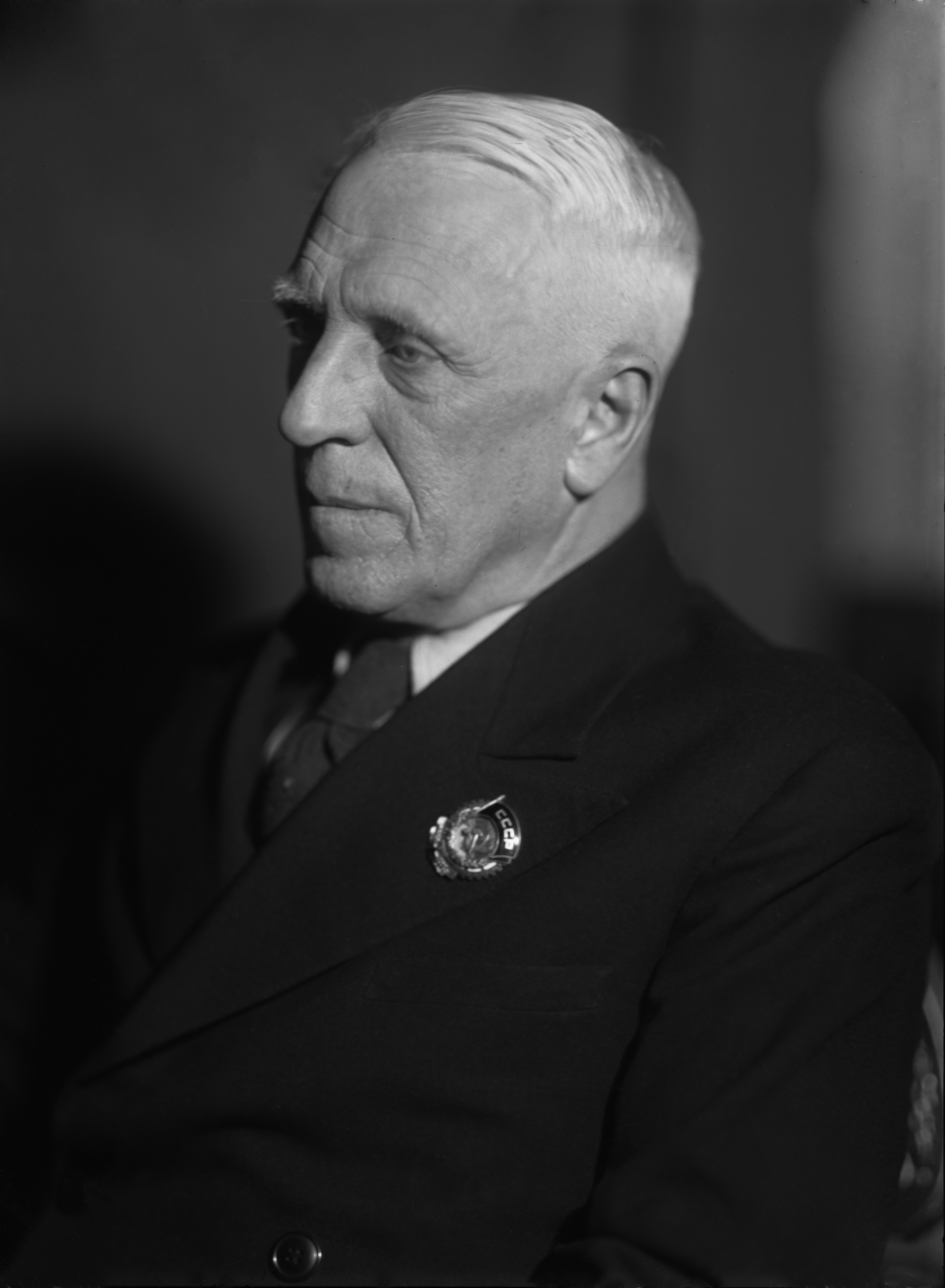 Академик СКОЧИНСКИЙ Александр Александрович (13.07.1874 – 06.10.1960). Фото 1939 года по случаю награждения Орденом Трудового Красного Знамени.